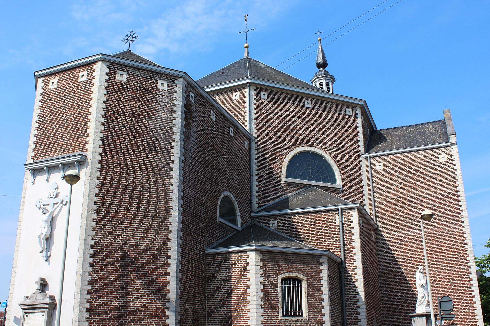 Zicht op het spel van de bouwvolumes van koor, koepel en dwarsbeuk